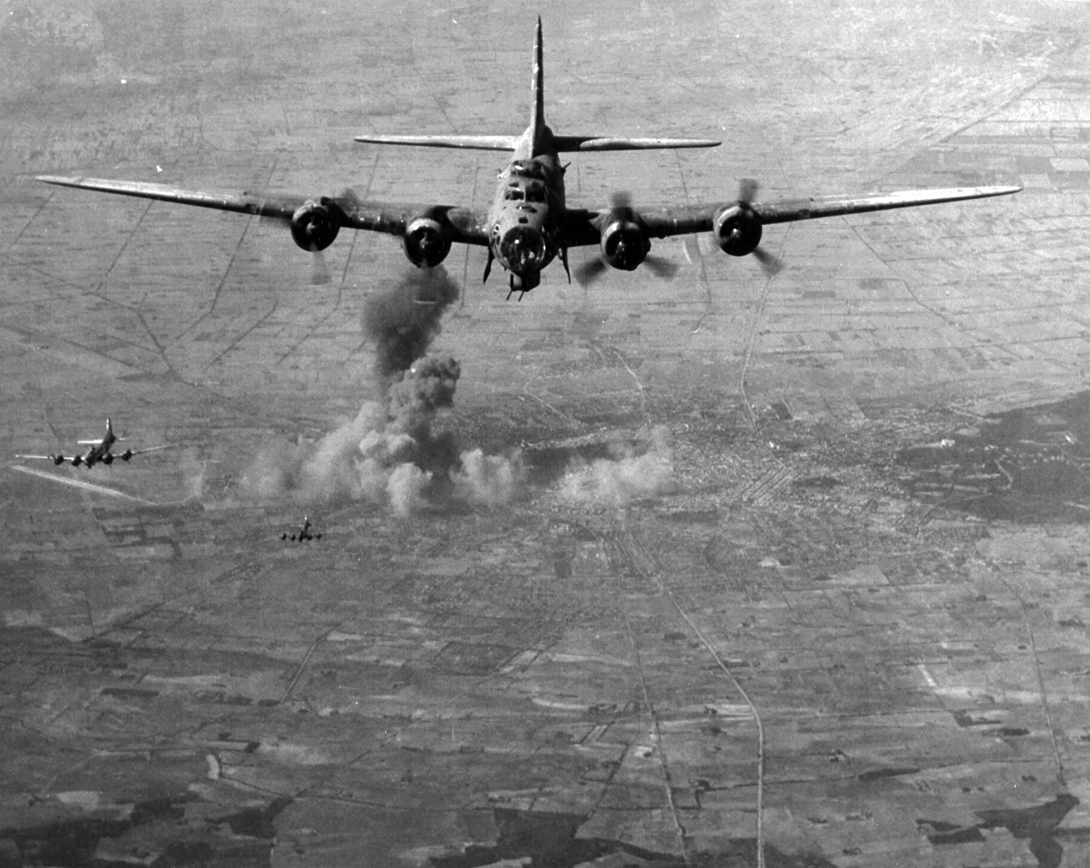 amerikai bombázása 1944-ben. Location: Hungary, Debrecen Tags: second World War, bombing, american brand, Boeing-brand Title: amerikai bombázása 1944-ben.